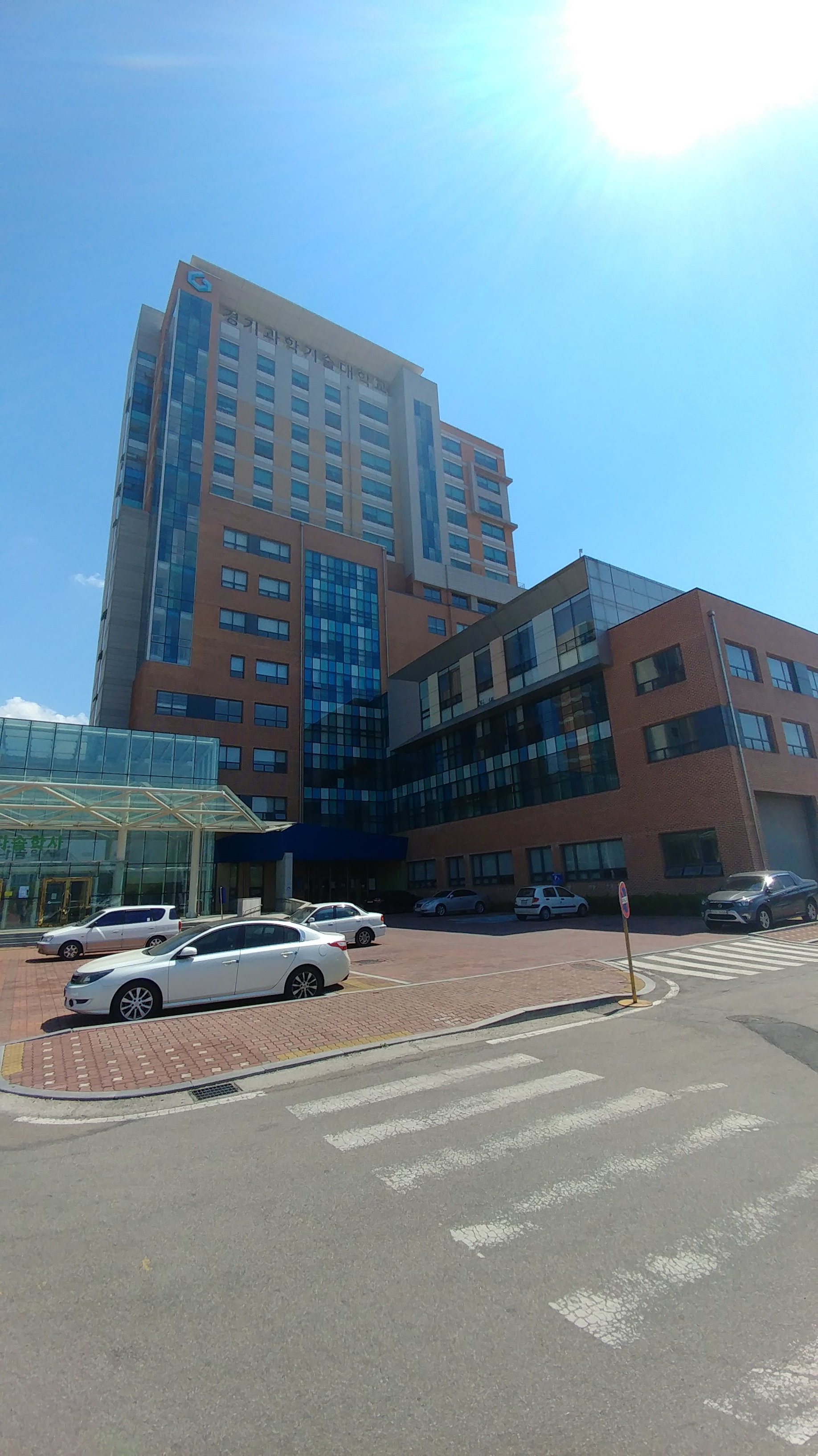 경기과학기술대학교 기숙사 다솜2관